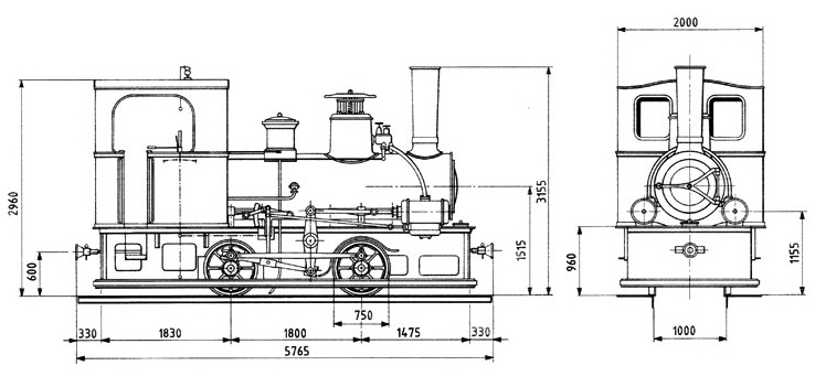 Typenskizze der Dampflokomotiven G 2/2 Nr. 1–3 der Tavannes-Tramelan-Bahn (TT), erbaut 1884 von der Lokomotivfabrik Winterthur.